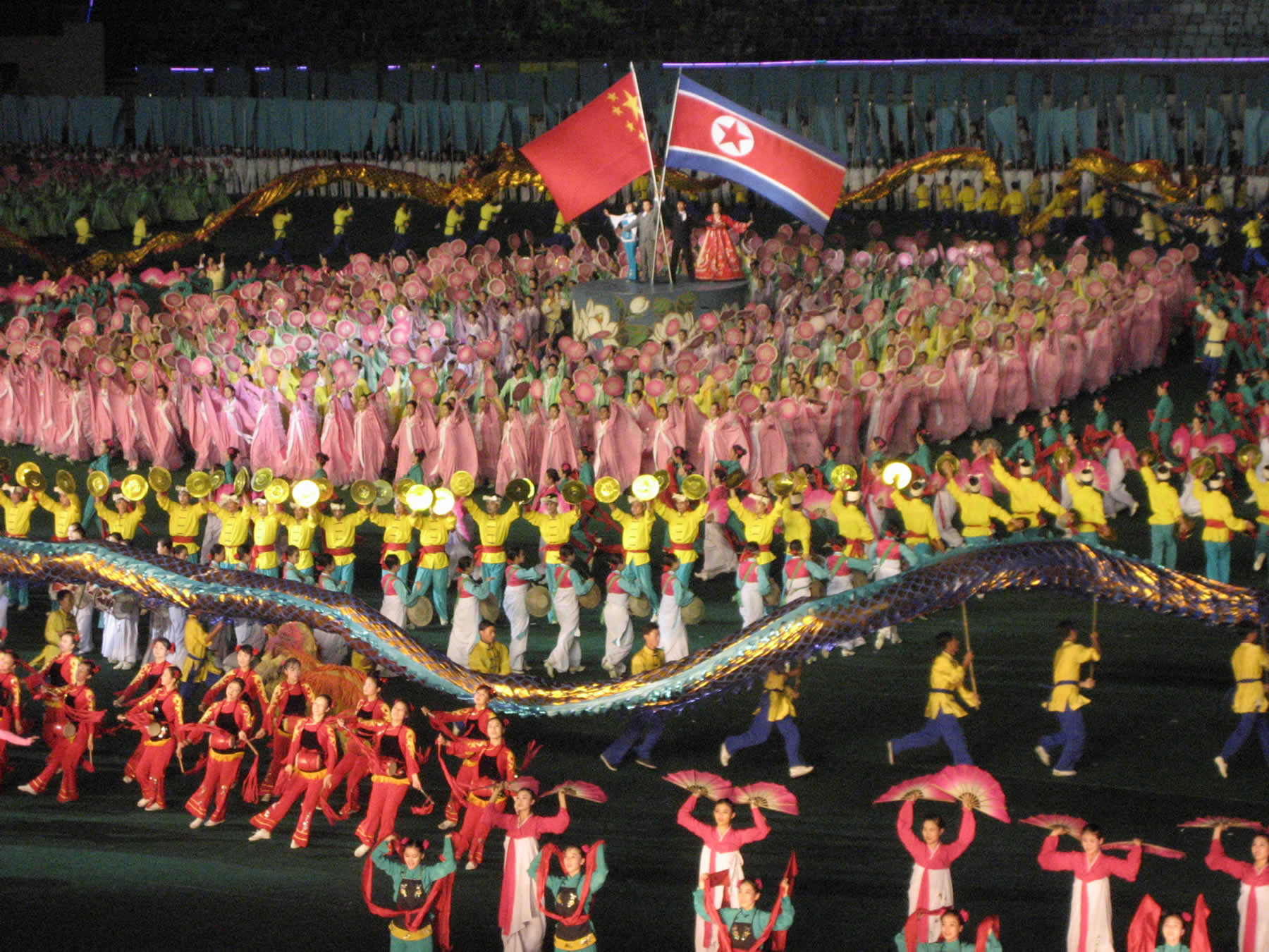 A moment at the Arirang Mass Games in Pyongyang.